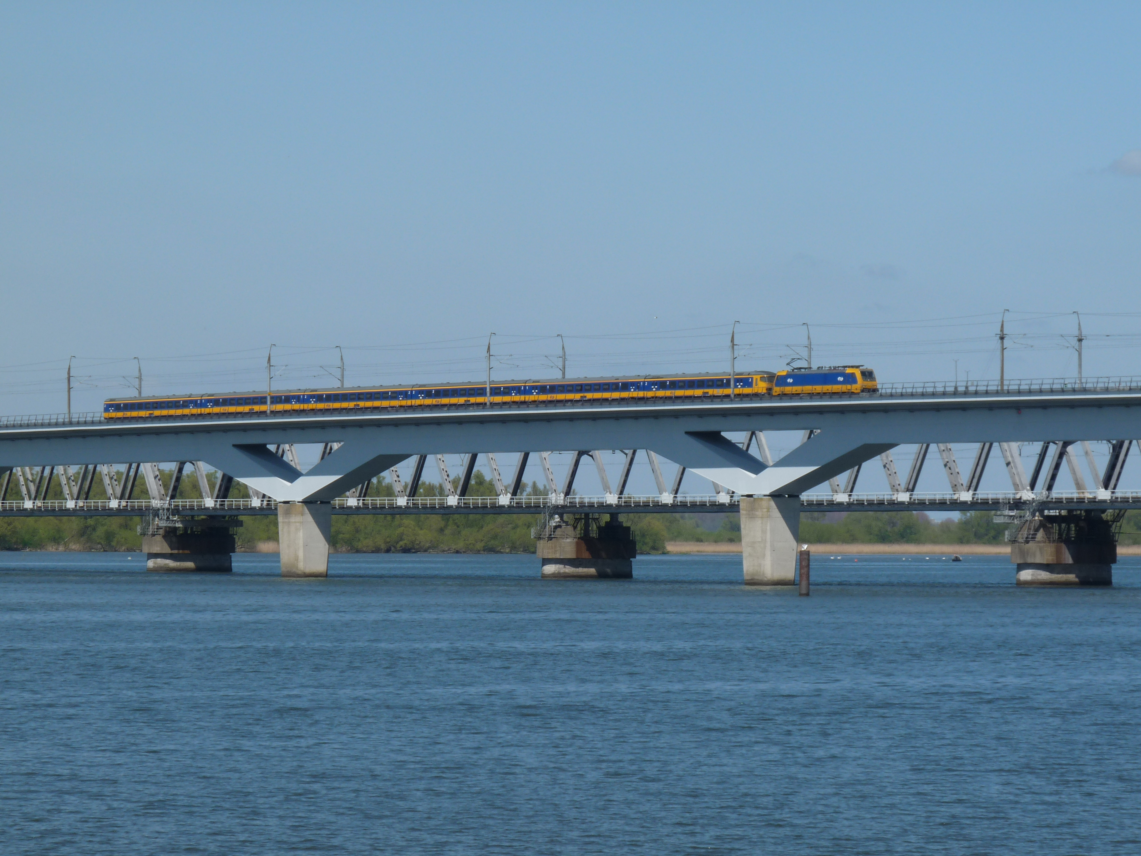 De IC-Direct rijdt over de HSL Moerdijkbrug